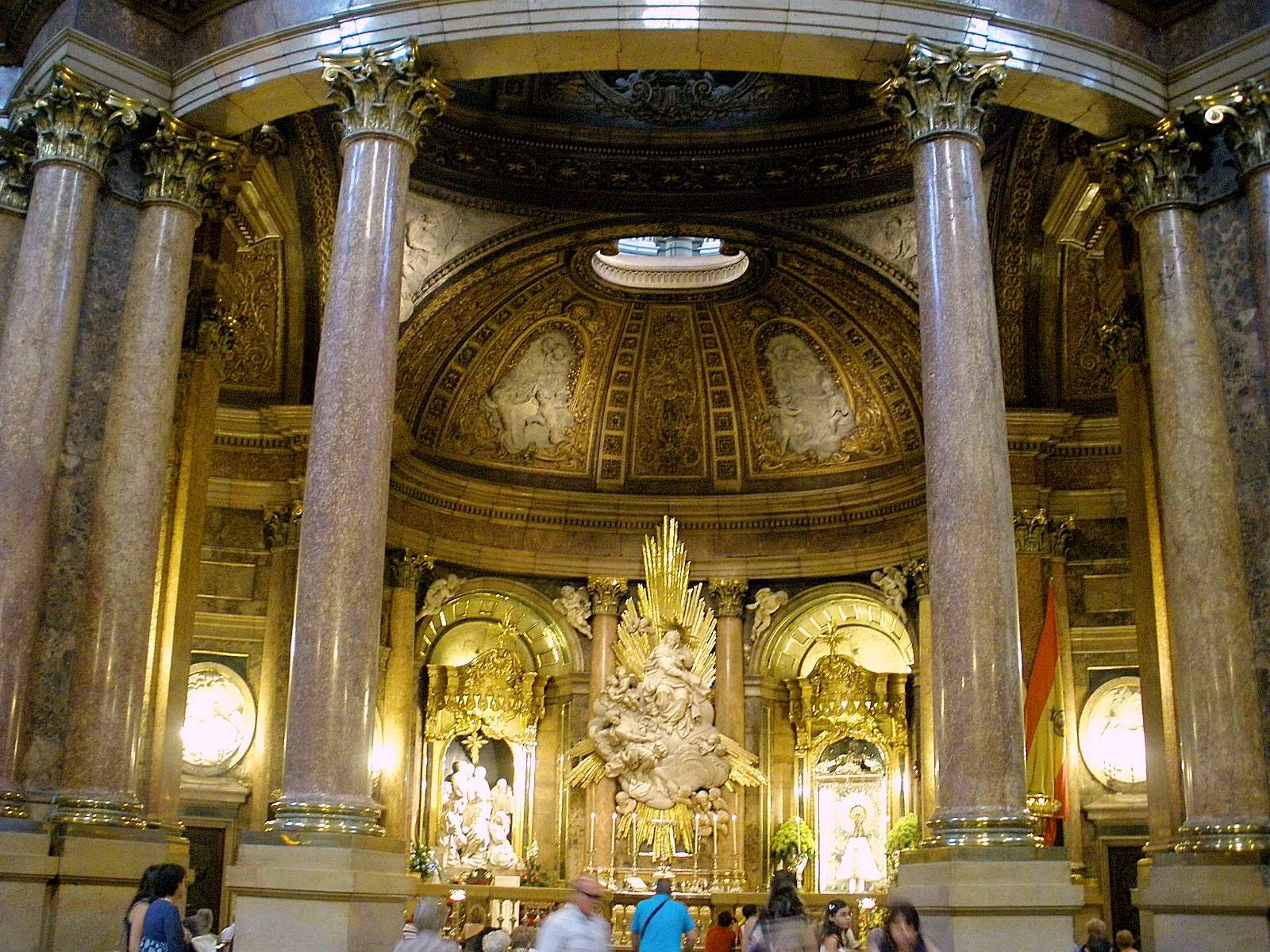 Basílica de Nuestra Señora del Pilar (Zaragoza). Santa Capilla de la Virgen